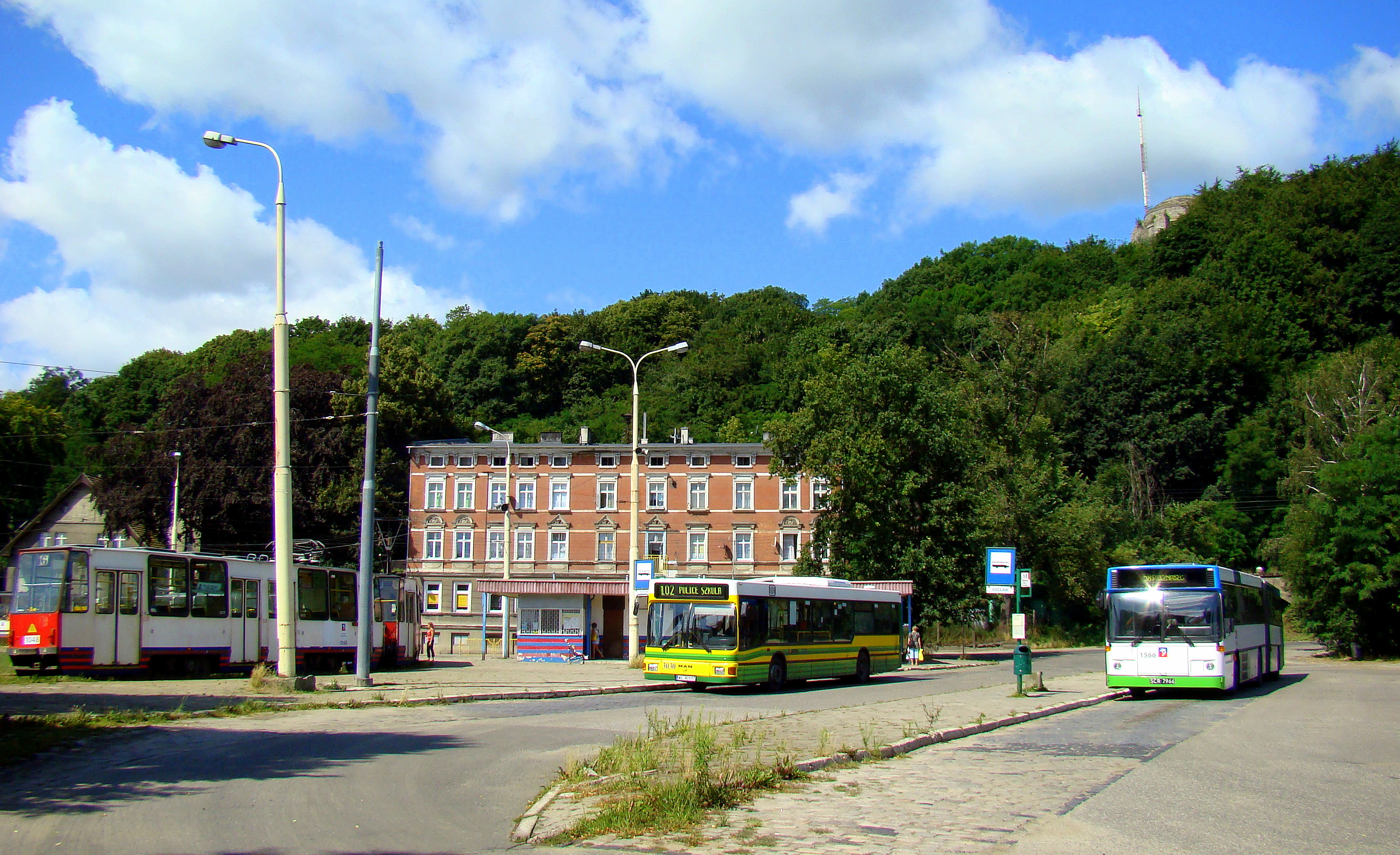 Szczecin-Gocław, Polska